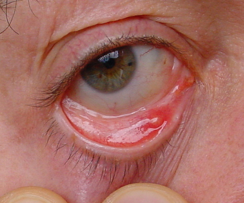 Gerstenkorn am Auge